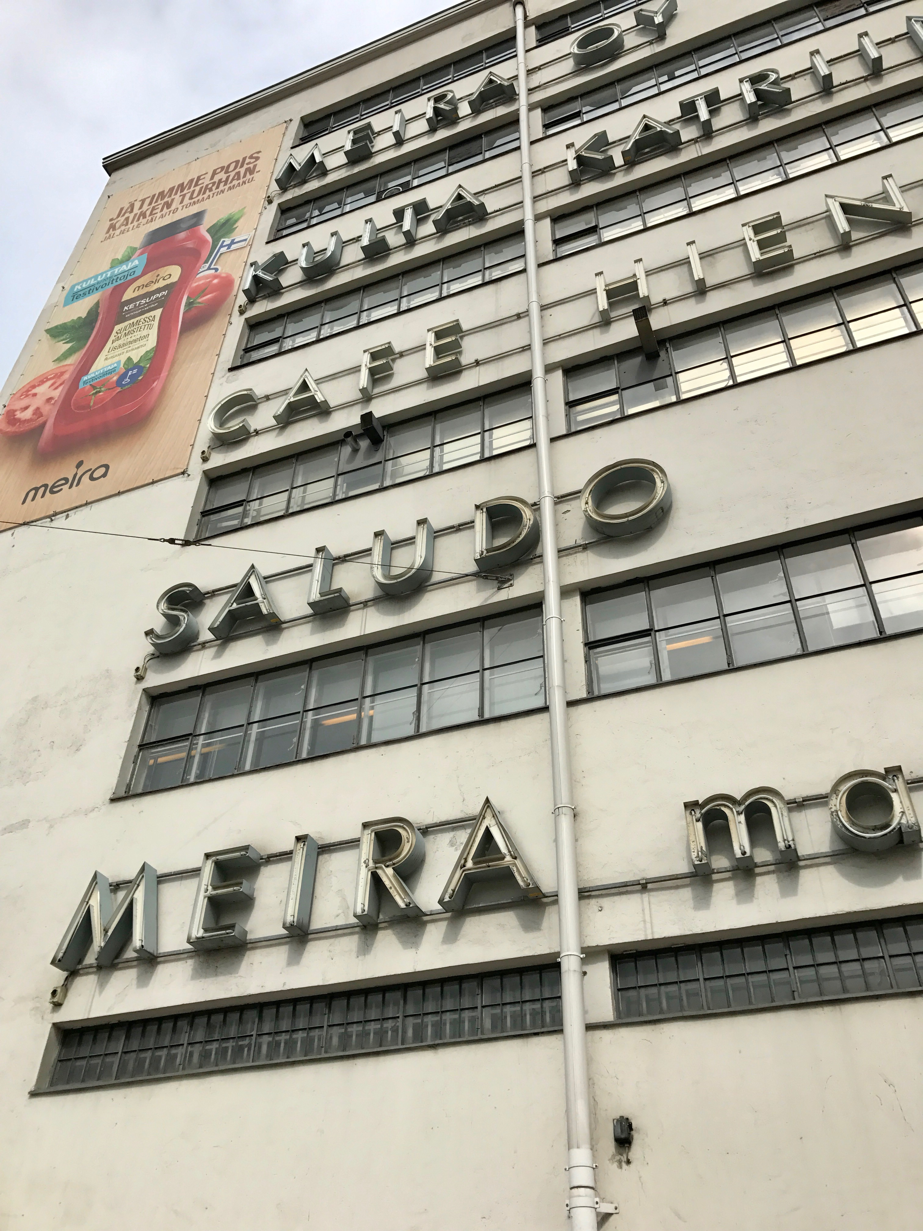 Meiran kahvipaahtimorakennuksen julkisivu Helsingissä, Aleksis Kiven katu 15.